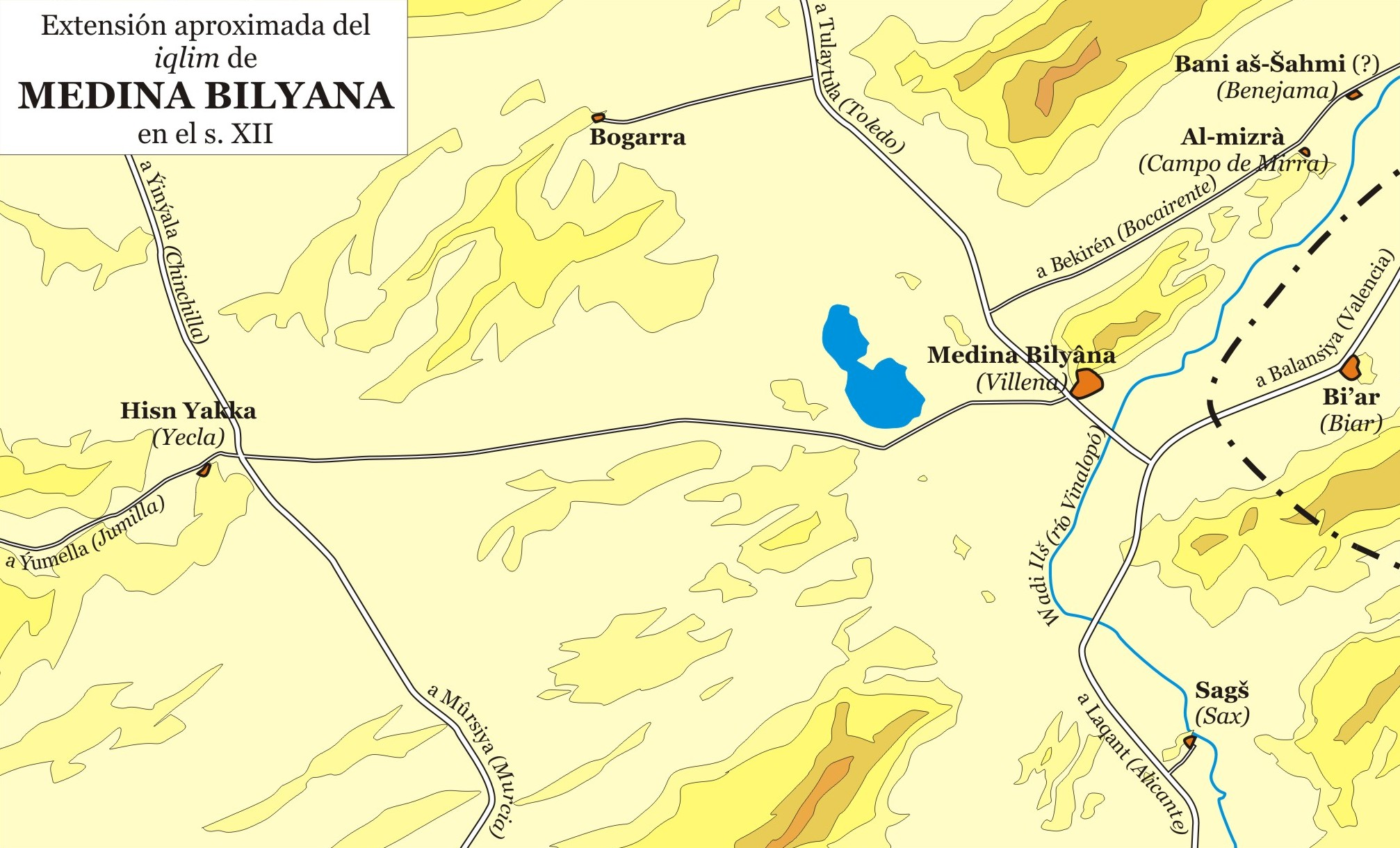 Extensión aproximada del iqlim (distrito) de Medina Bilyâna (Villena) alrededor del siglo XII